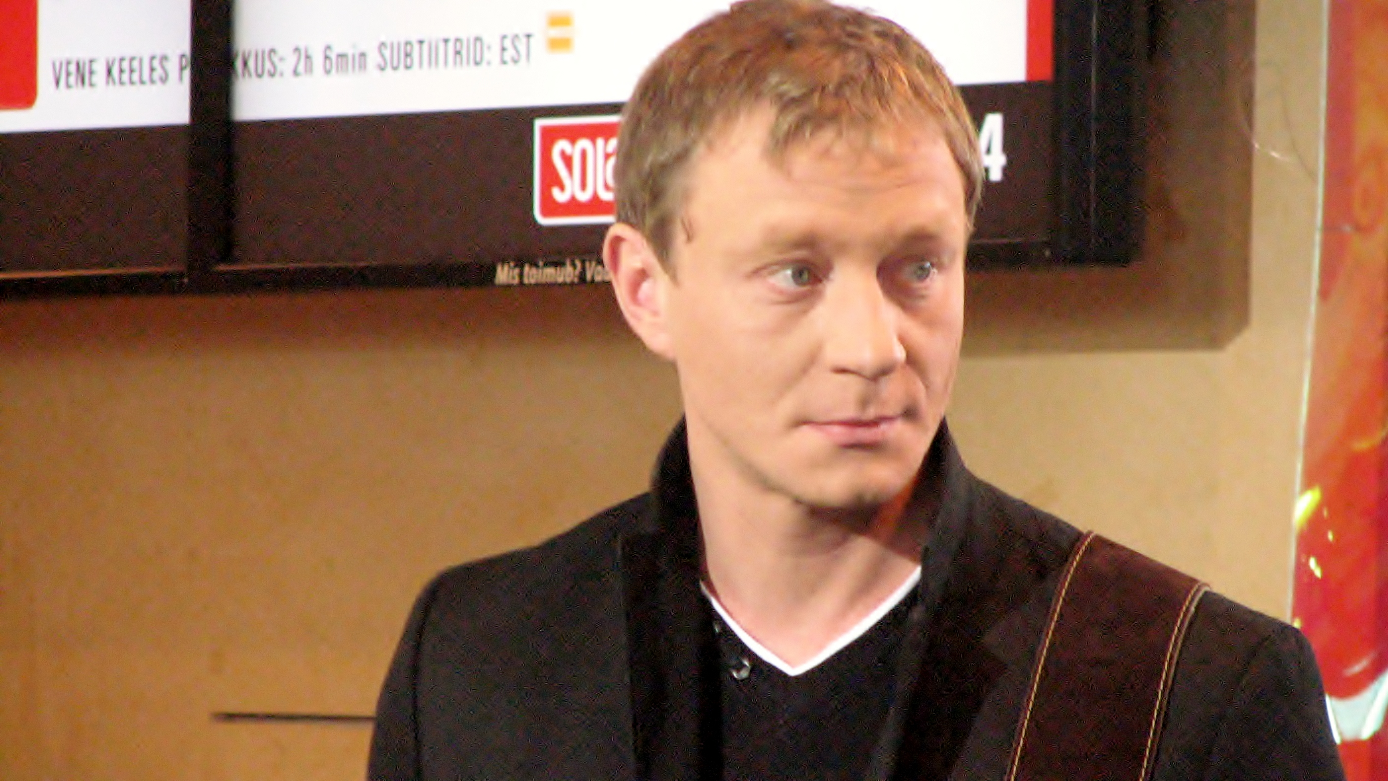 Kiur Aarma ansambel Lenna koosseisus Ringvaate Eesti Laulu salvestusel